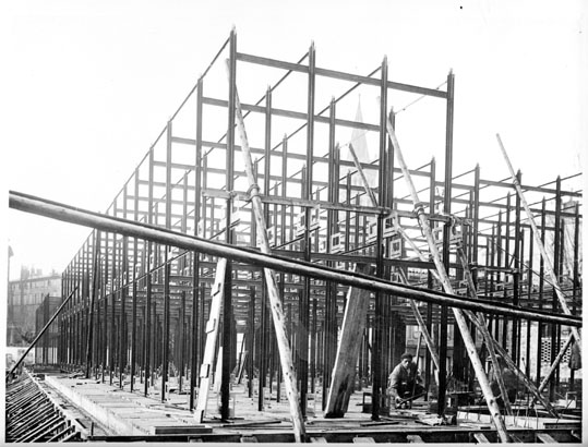 Fonds Trutat - Photographie ancienne Cote : BIBLC36 Localisation : Fonds ancien (S 30) Original non communicable Titre : Structure métallique des magasins, chantier de construction de la Bibliothèque municipale de Toulouse, rue de Périgord, 1932 Auteur : Trutat, Eugène Rôle de l’auteur : Photographe Lieu de création : Toulouse (Haute-Garonne) Date de création : 1932 Observations : Cliché Albinet. Mot(s)-clé(s) : -- Extérieur -- Chantier -- Construction -- Métal -- Bibliothèque -- Poutre -- Ouvrier -- Bibliothèque municipale de Toulouse -- Toulouse (Haute-Garonne) -- Haute-Garonne (Midi-Pyrénées) -- France -- 20e siècle, 2e quart Médium : Photographies -- Noir et blanc -- Scènes Bibliothèque de Toulouse. Domaine public